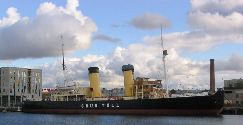 Suur Tõll Admiraliteedibasseinis